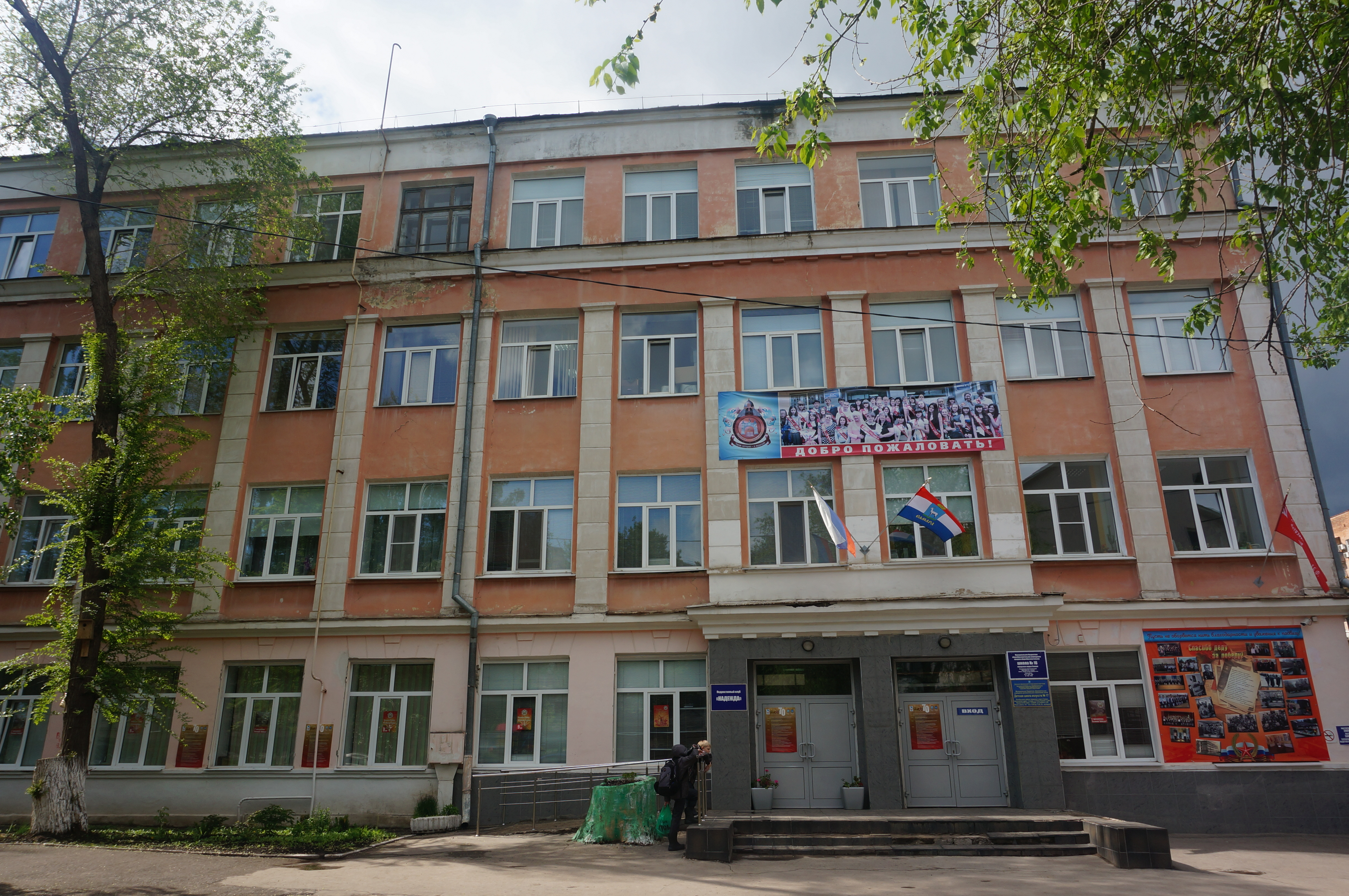 Самарская школа № 16. Стоит на фундаменте, оставшемся после разборки Никольского собора